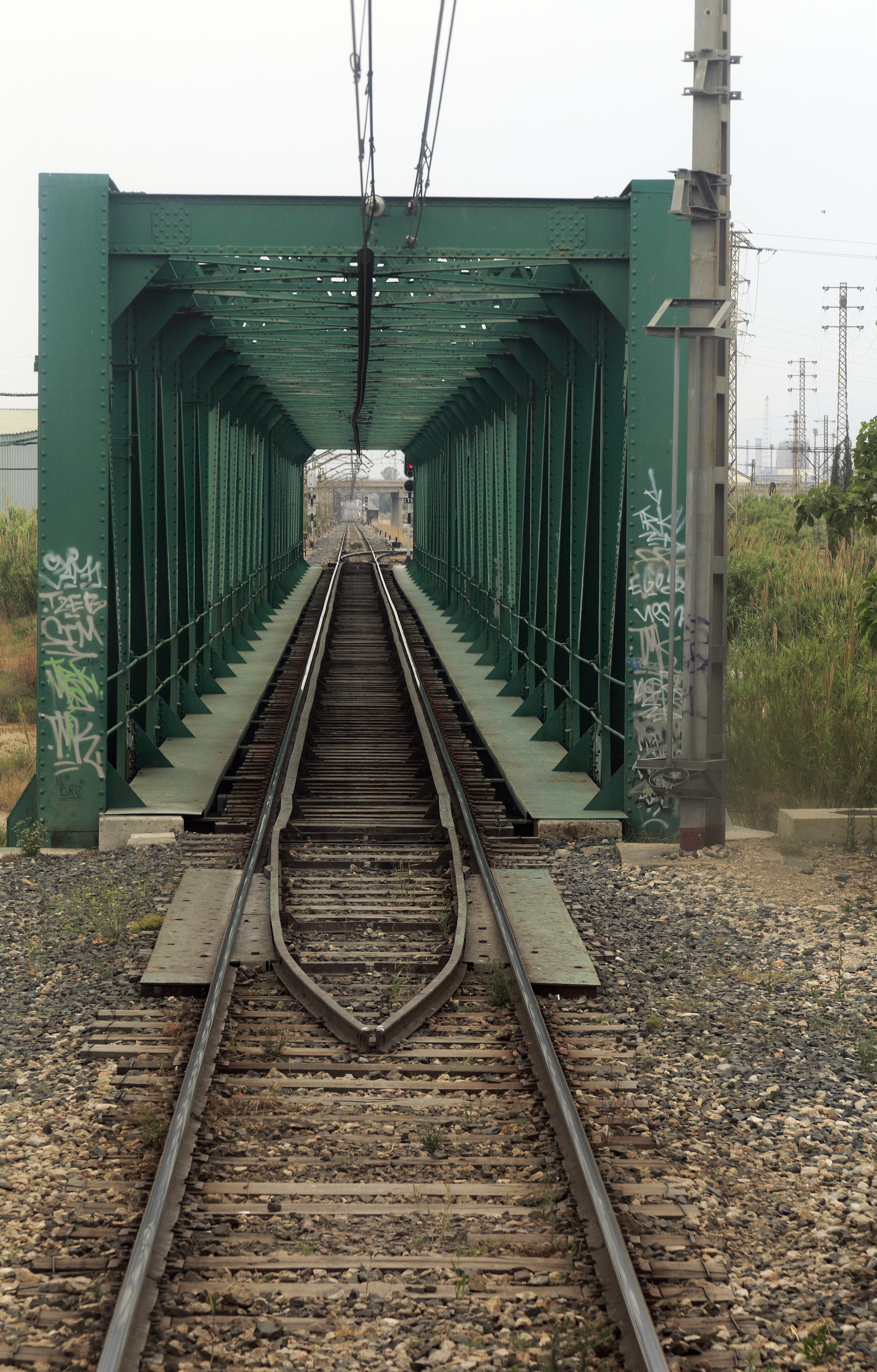 Richtung Valencia, vor dem Übergang auf die offene Fahrbahn liegt einer der für das spanische Breitspurnetz typischen Eingleiser. Passend dazu ist die Rillenweite zu den Schutzschienen deutlich kleiner als bei Neubauten üblich. Im Brückenbalkenbereich liegt noch die Oberbauart N mit offenen Unterlagsplatten.